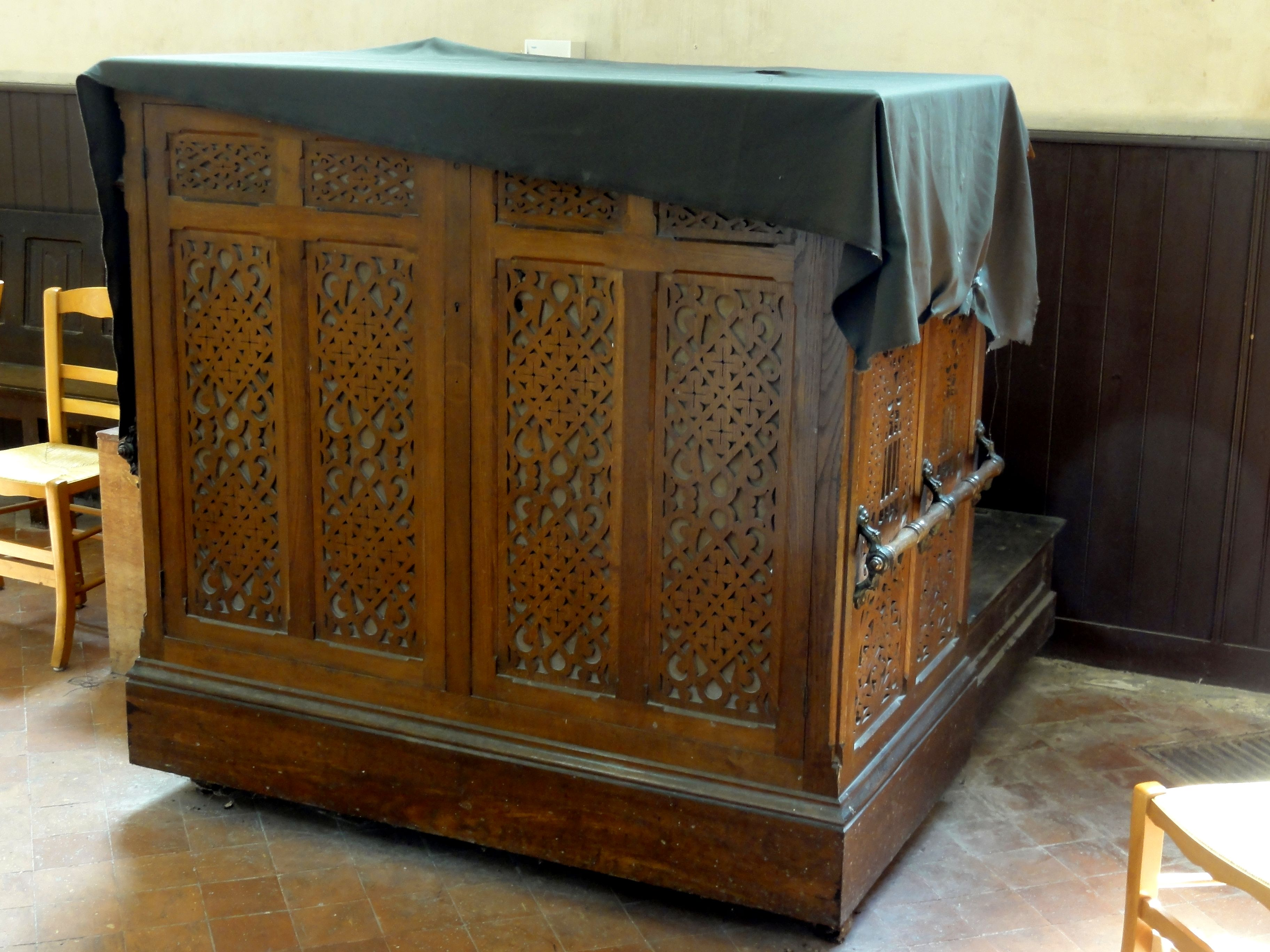 Orgue.